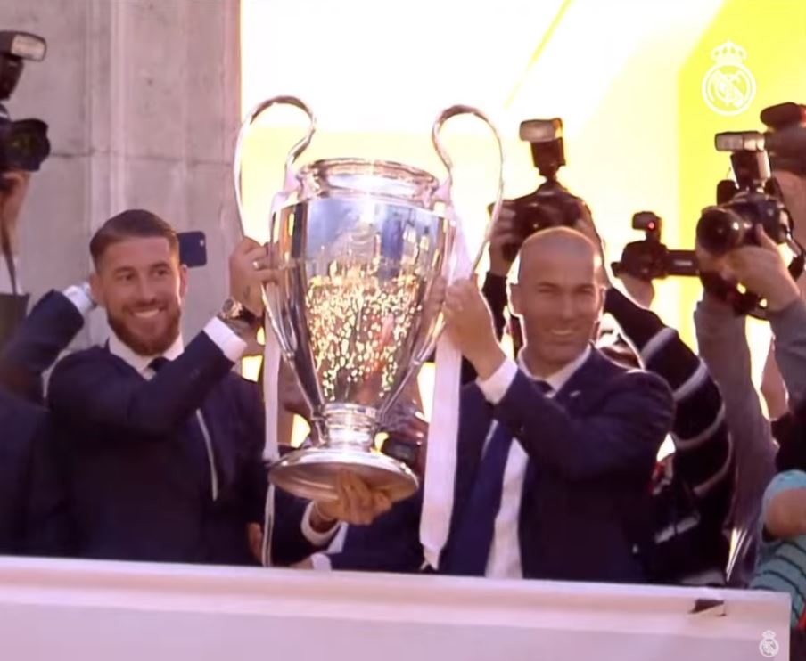 Ramos y Zidane con la Undécima Copa de Europa en el balcón del Palacio Presidencial de la Comundidad de Madrid en la Puerta del Sol.